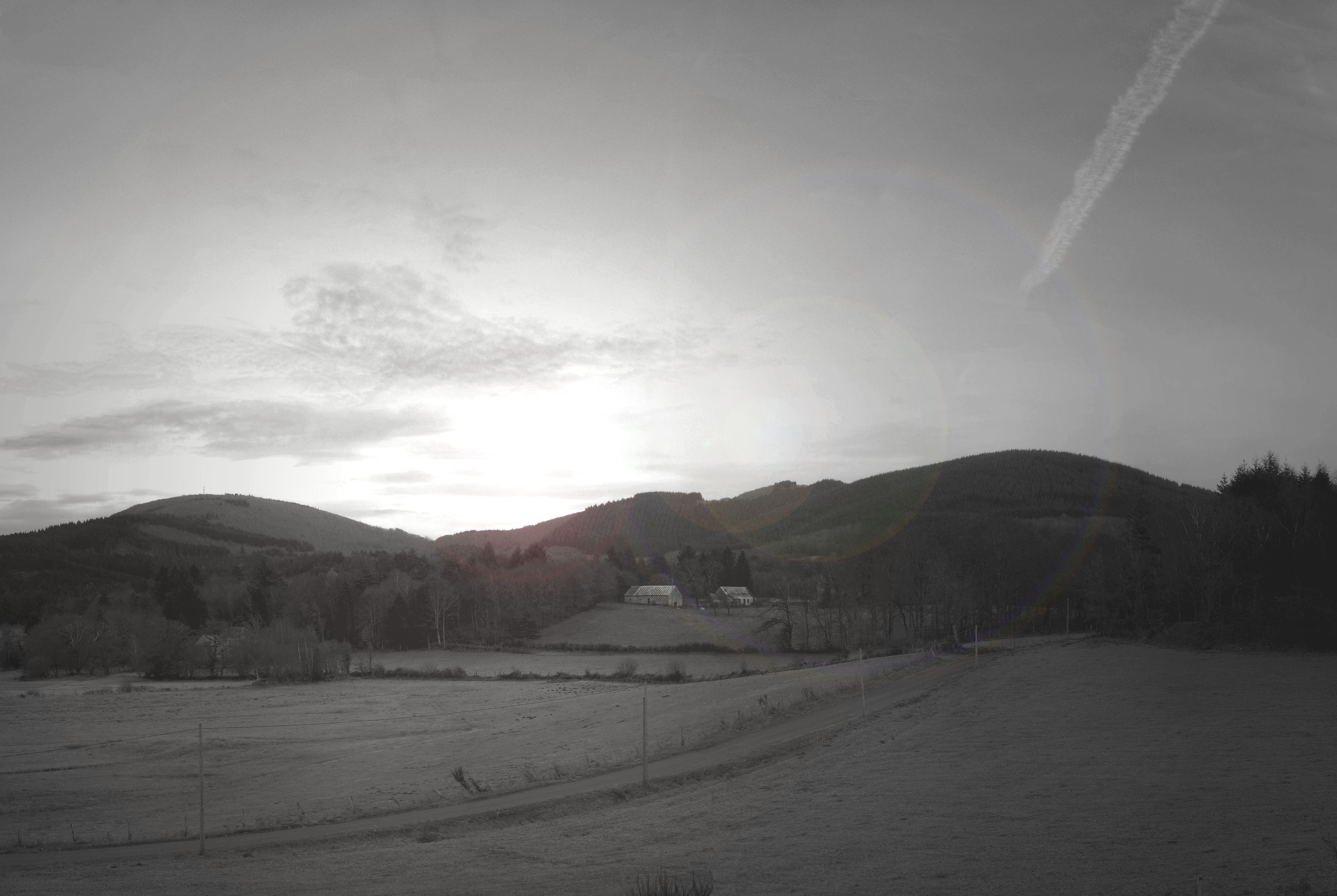 Les Monédières